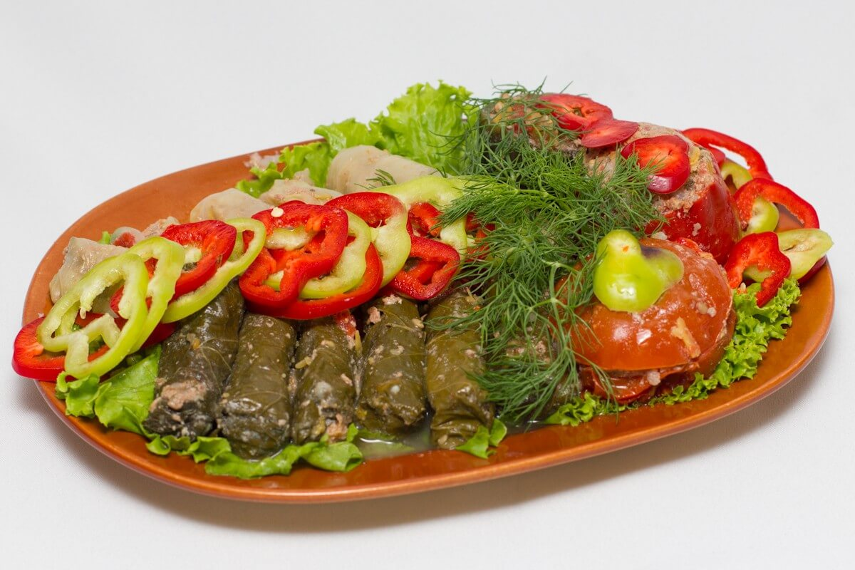 Տոլմա